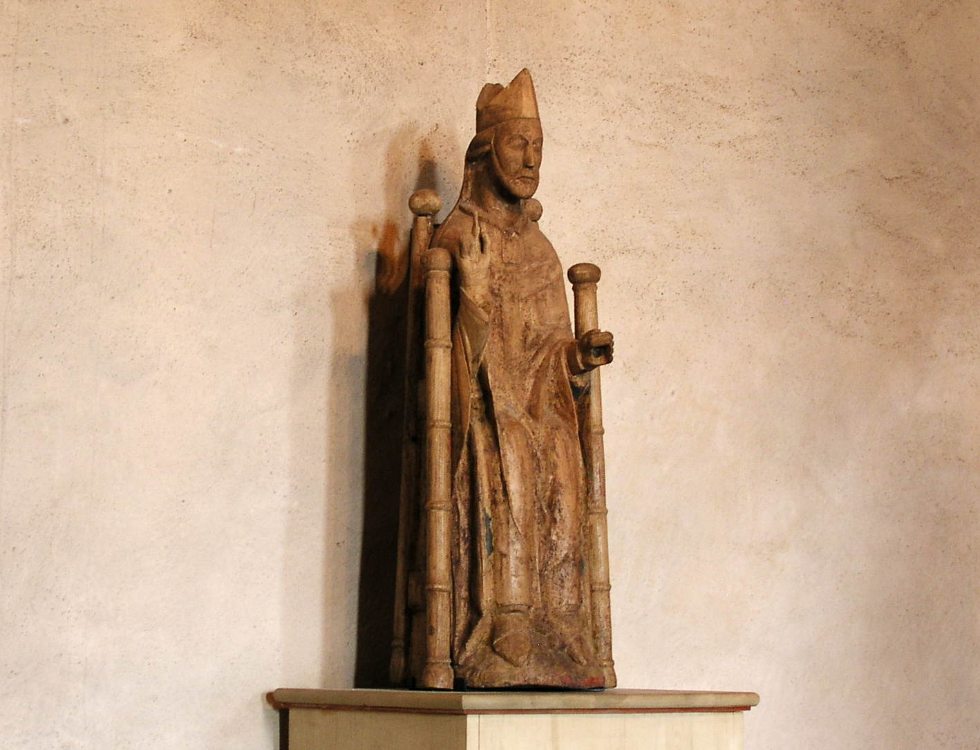 Heda kyrka, Diocese of Linköping, Ödeshögs kommun. Statue.